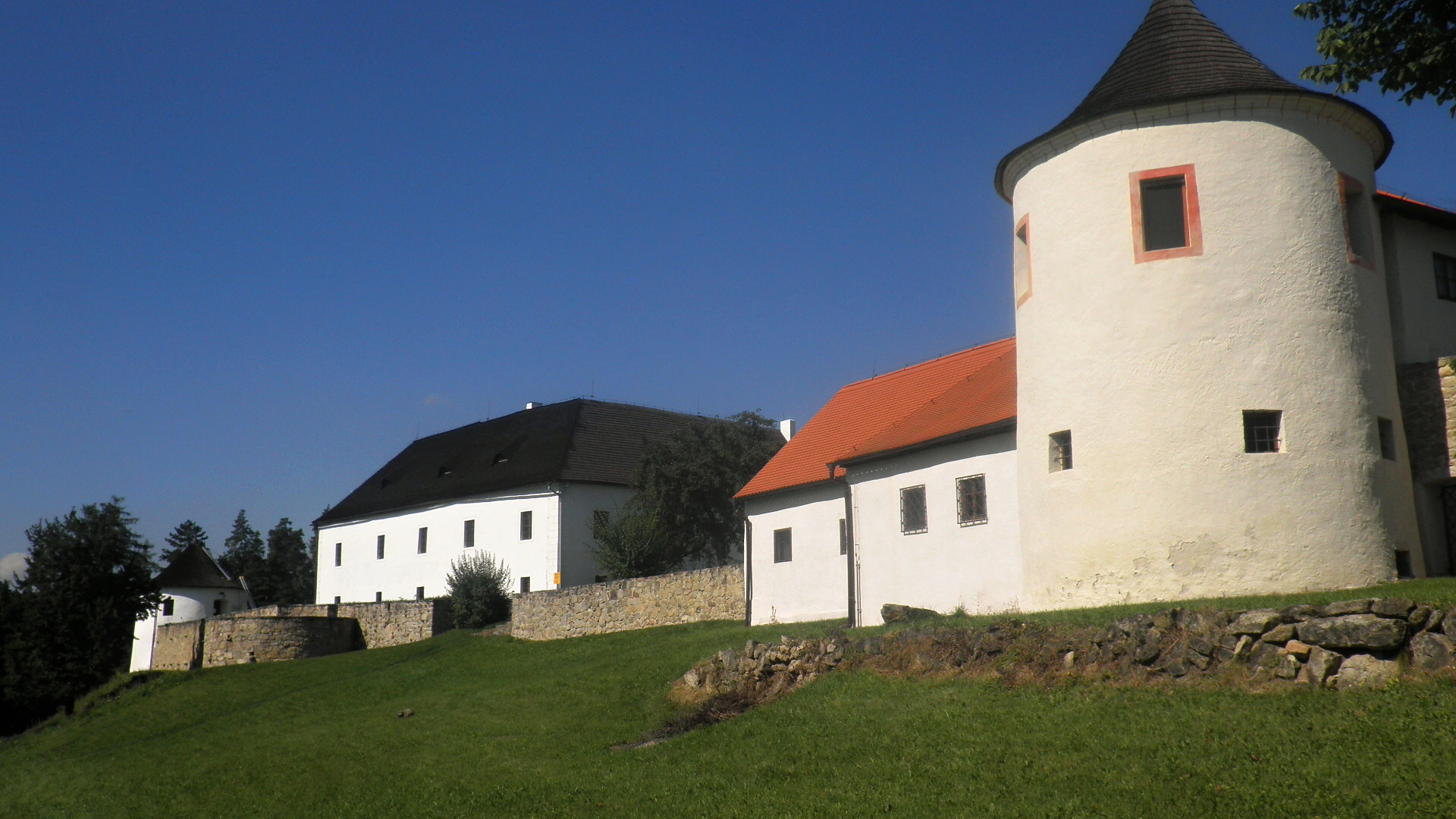 Tvrz, s omezením: bez přístavků u bašty A, B a C (Žumberk), Žumberk